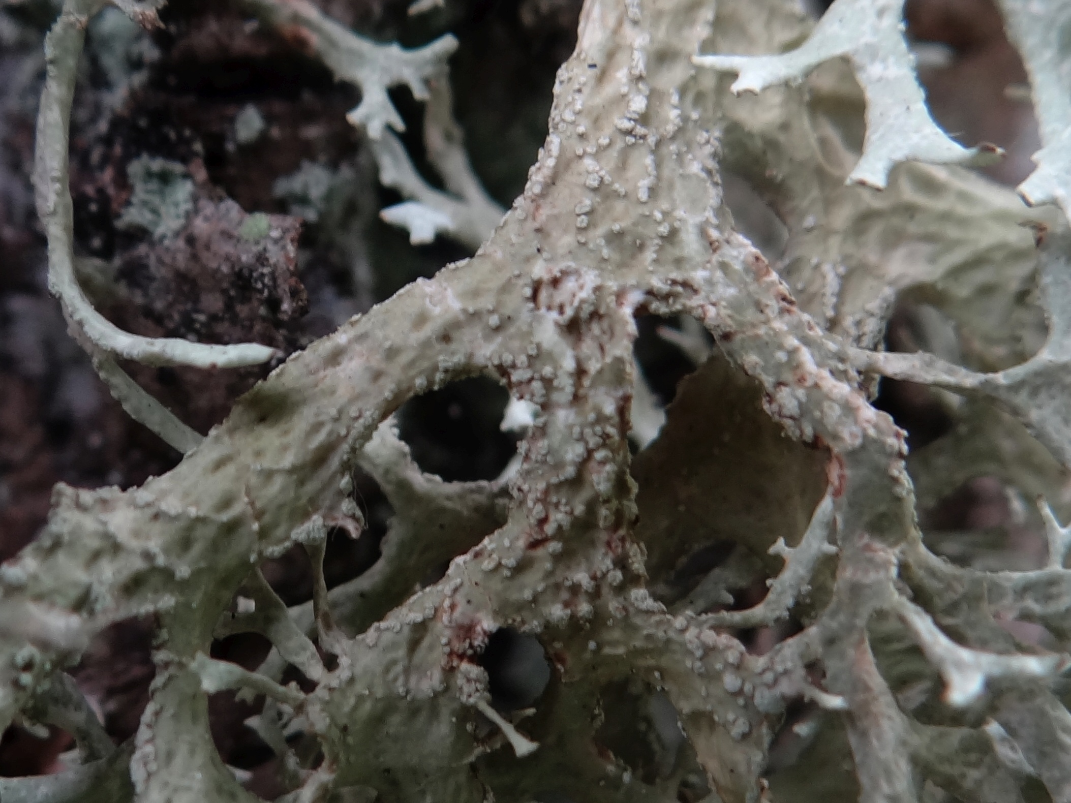 Ramalina pollinaria (location:Slovakia, Vyšné Ružbachy, park)